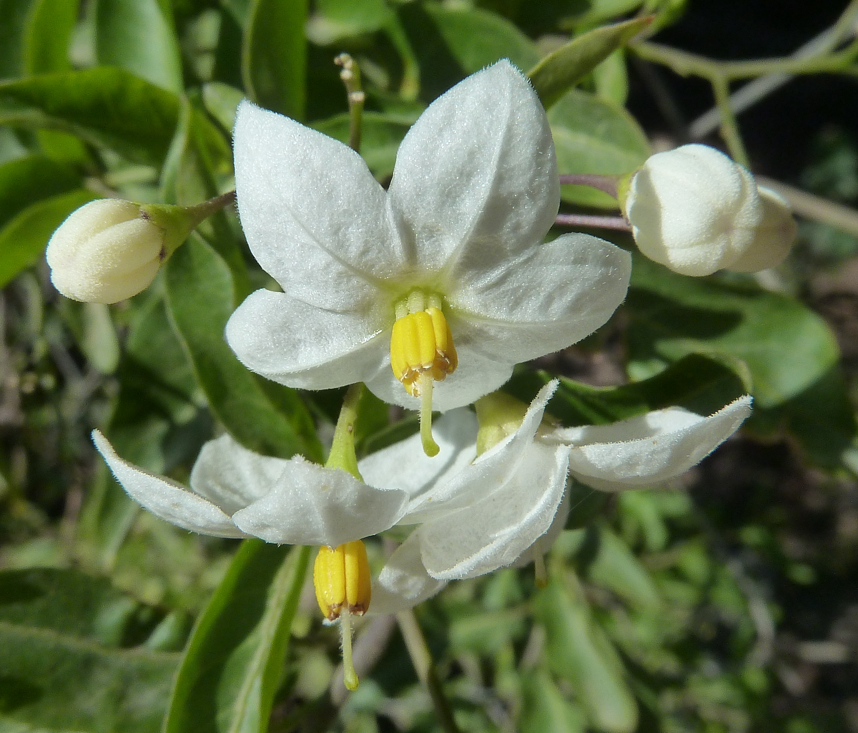 Solanum laxum (=S. jasminoides) : Flores y botones - Ornamental, Camino de la Azarbe de Patricio, Albatera (Alicante, España).